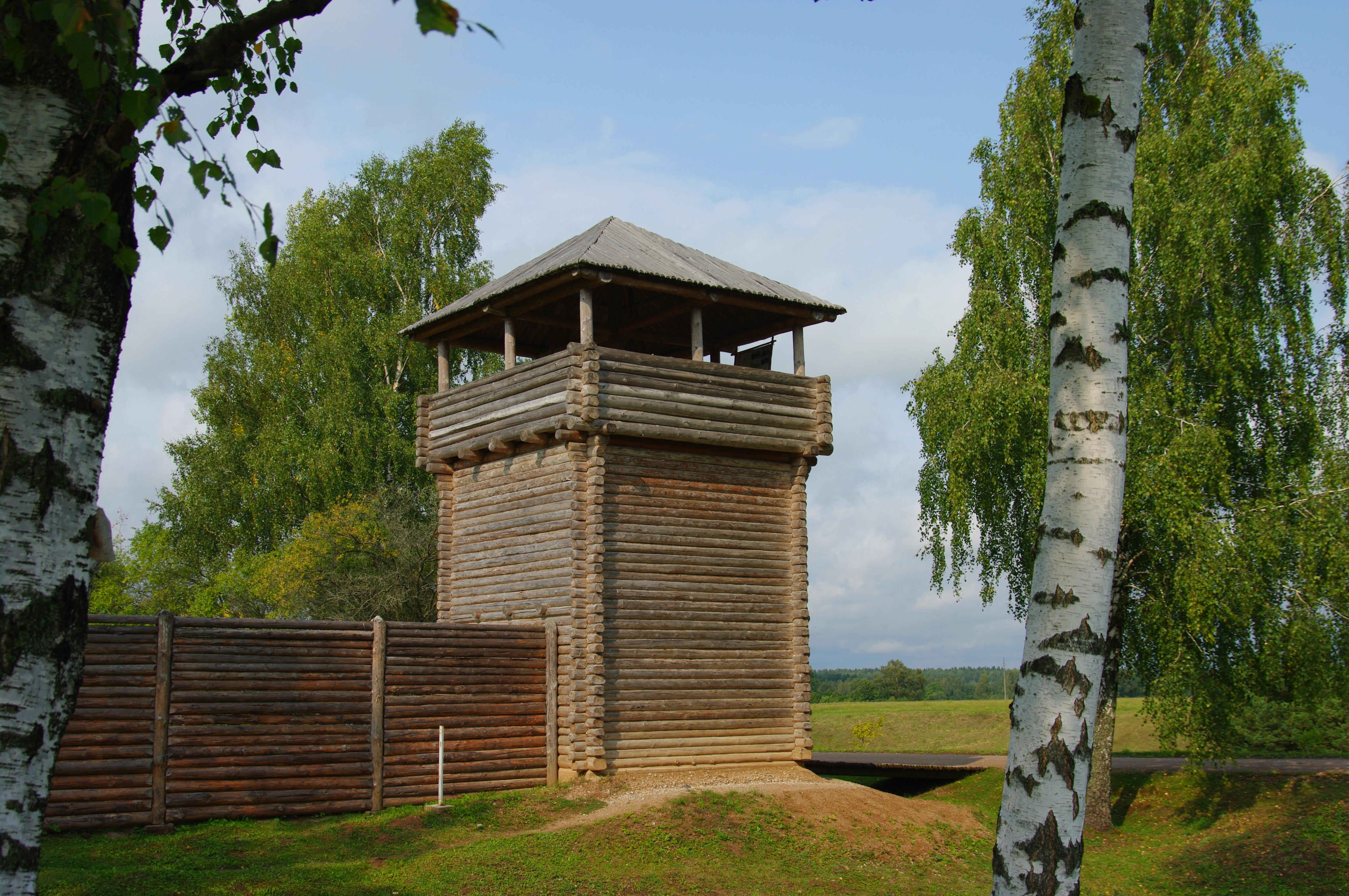 Šeiminiškėlių piliakalnis (Vorutos pilis)